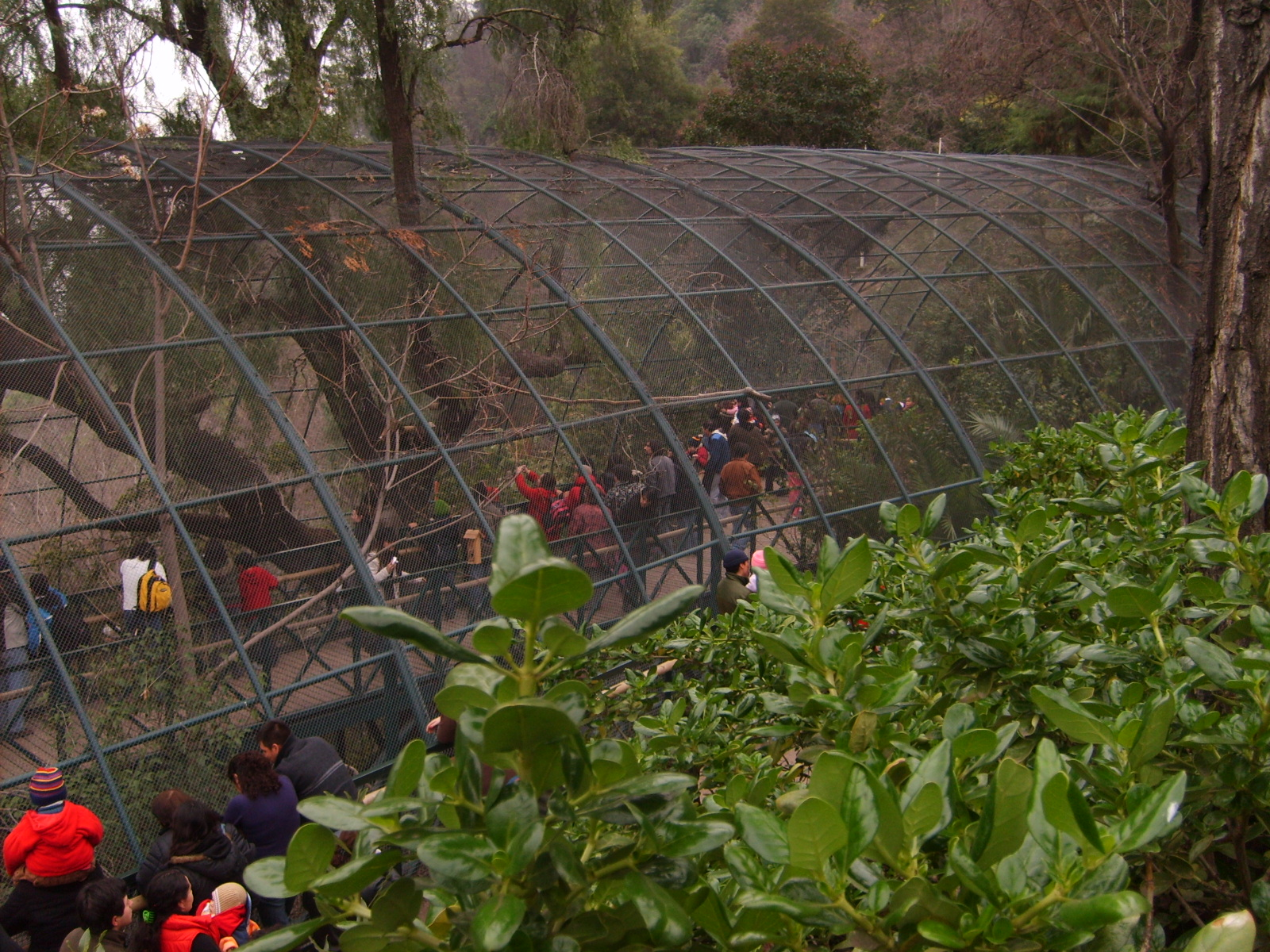 El aviario del Zoológico Nacional de Chile, ubicado en Santiago.